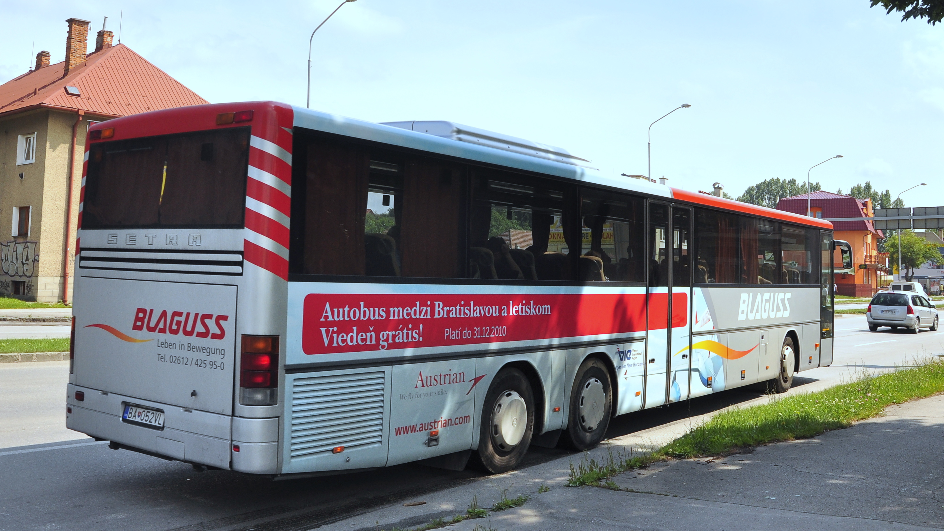 Autobus Setra S 319UL